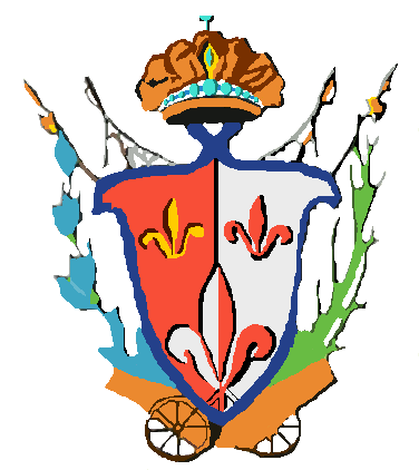 Escudo del municipio Araure, estado Portuguesa, Venezuela